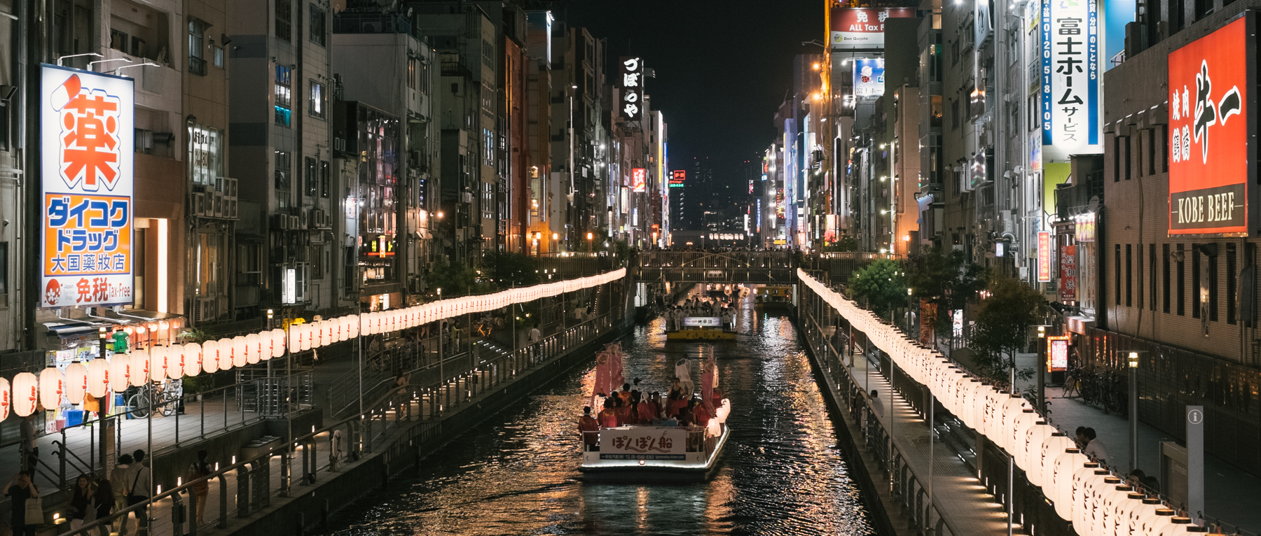 20160713-DSCF7667